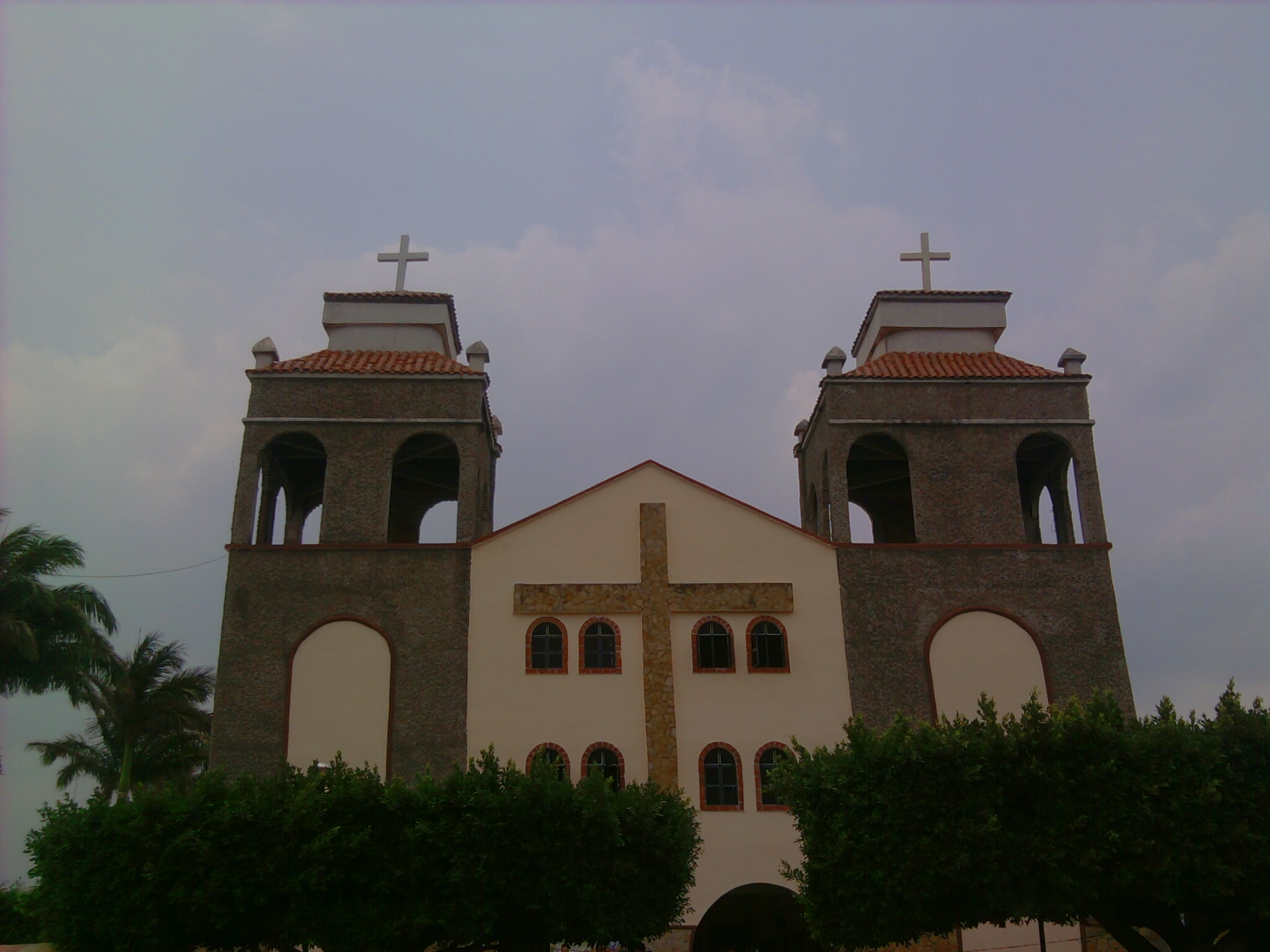 Delegación Terán, Tuxtla Gutiérrez